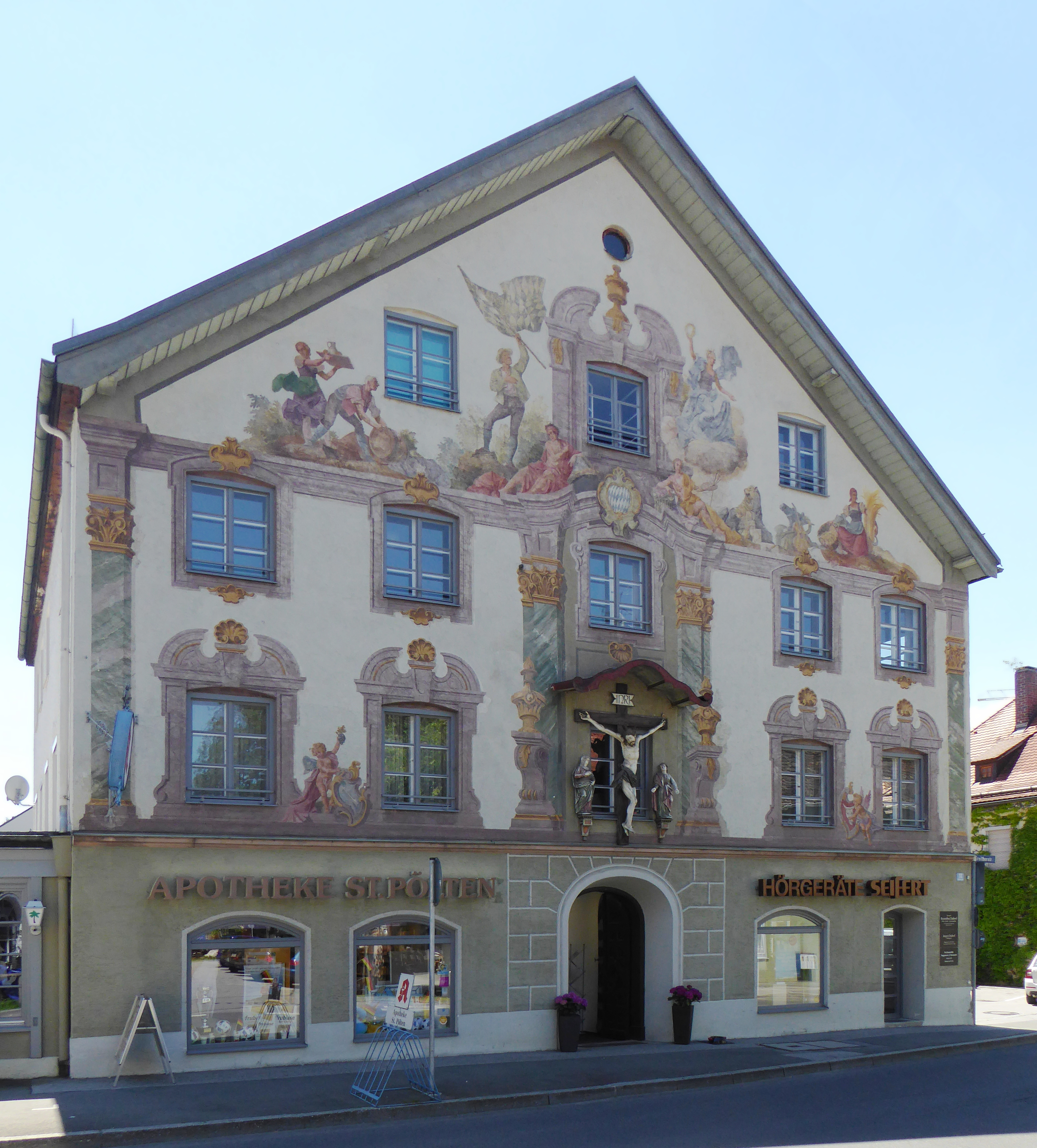 Weilheim in Oberbayern, Pöltnerstraße 32; ehemals Gasthaus zum Gattinger.